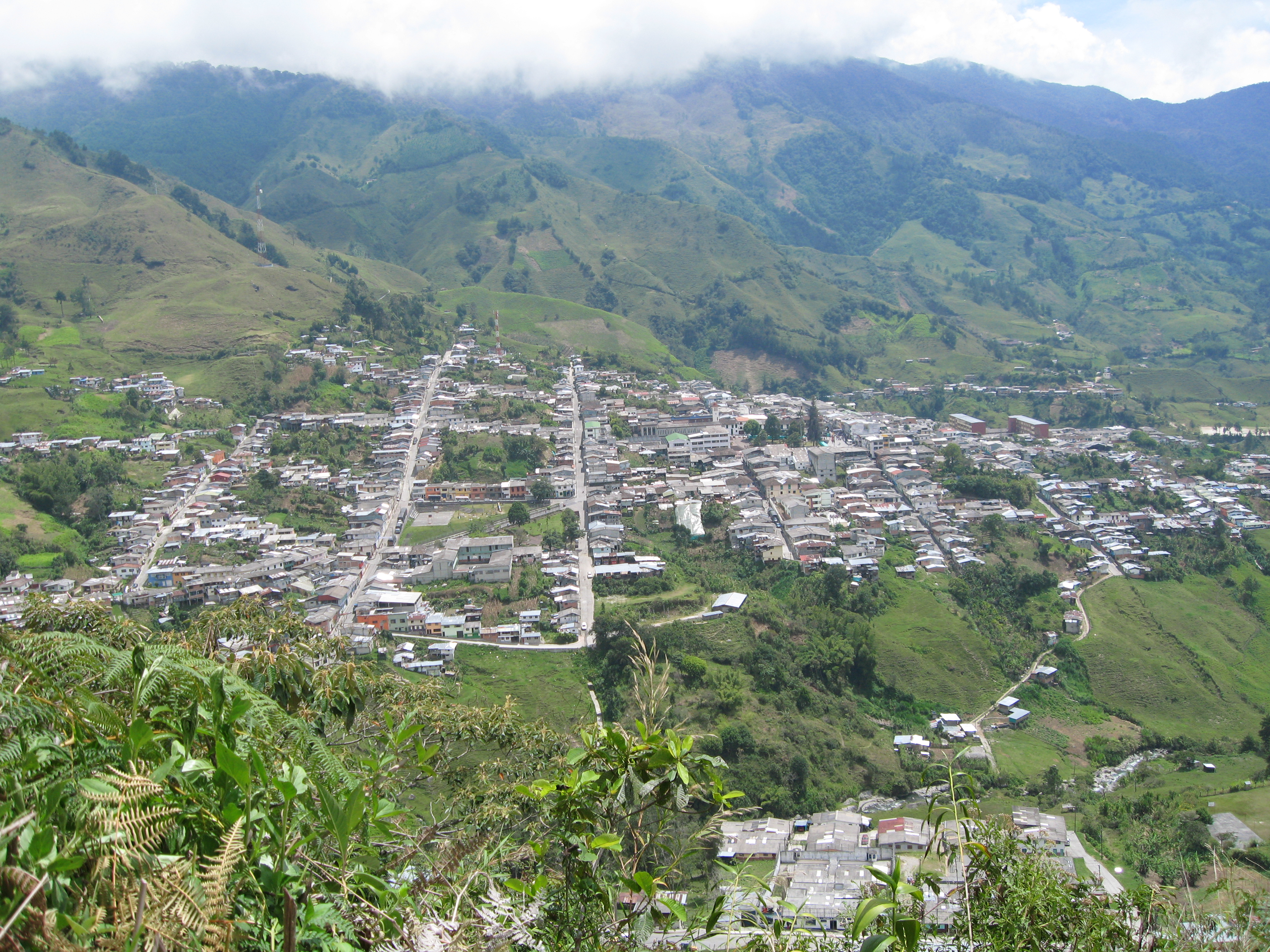 pensilvania caldas